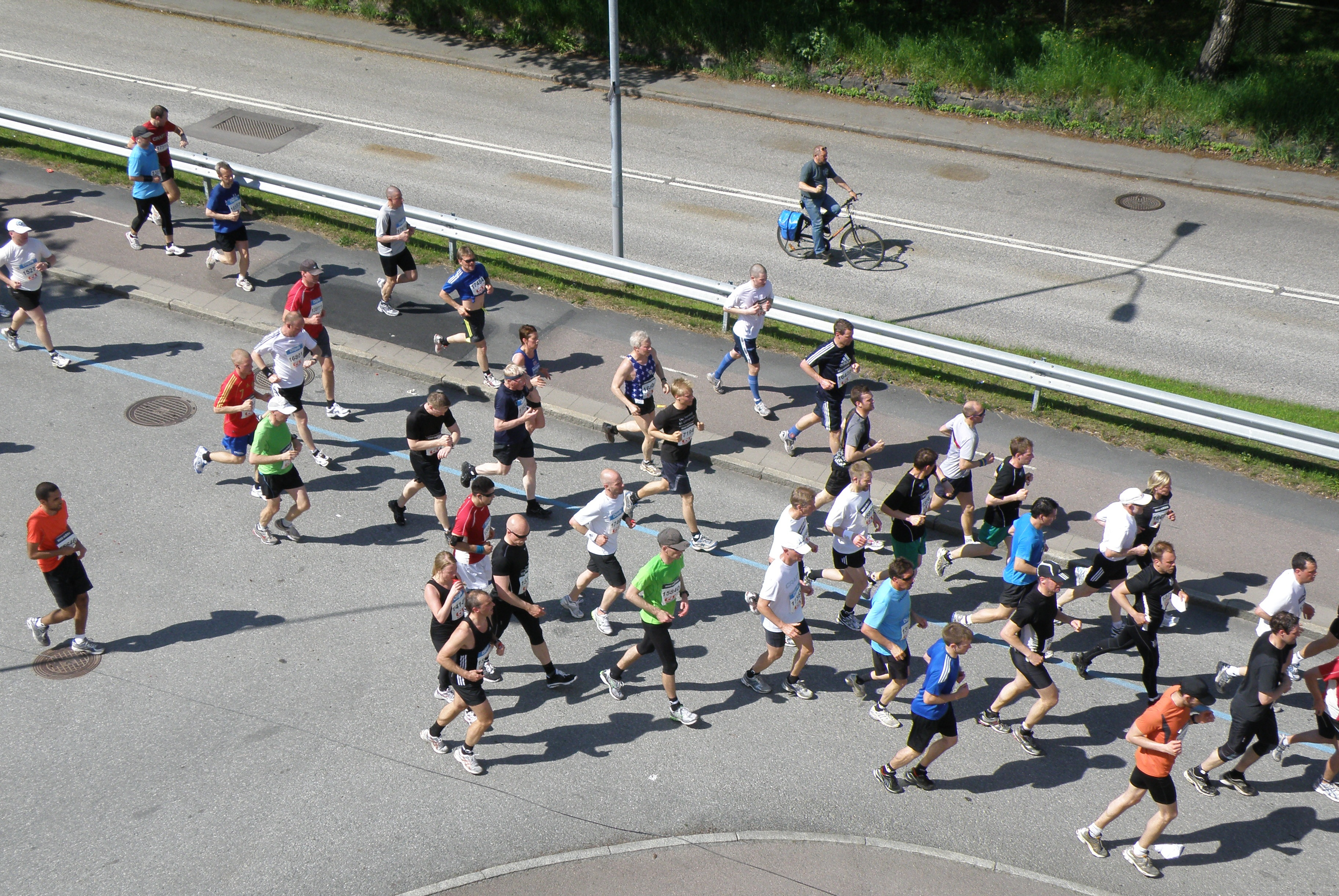 Deltagare i Göteborgsvarvet passerar Lindholmen